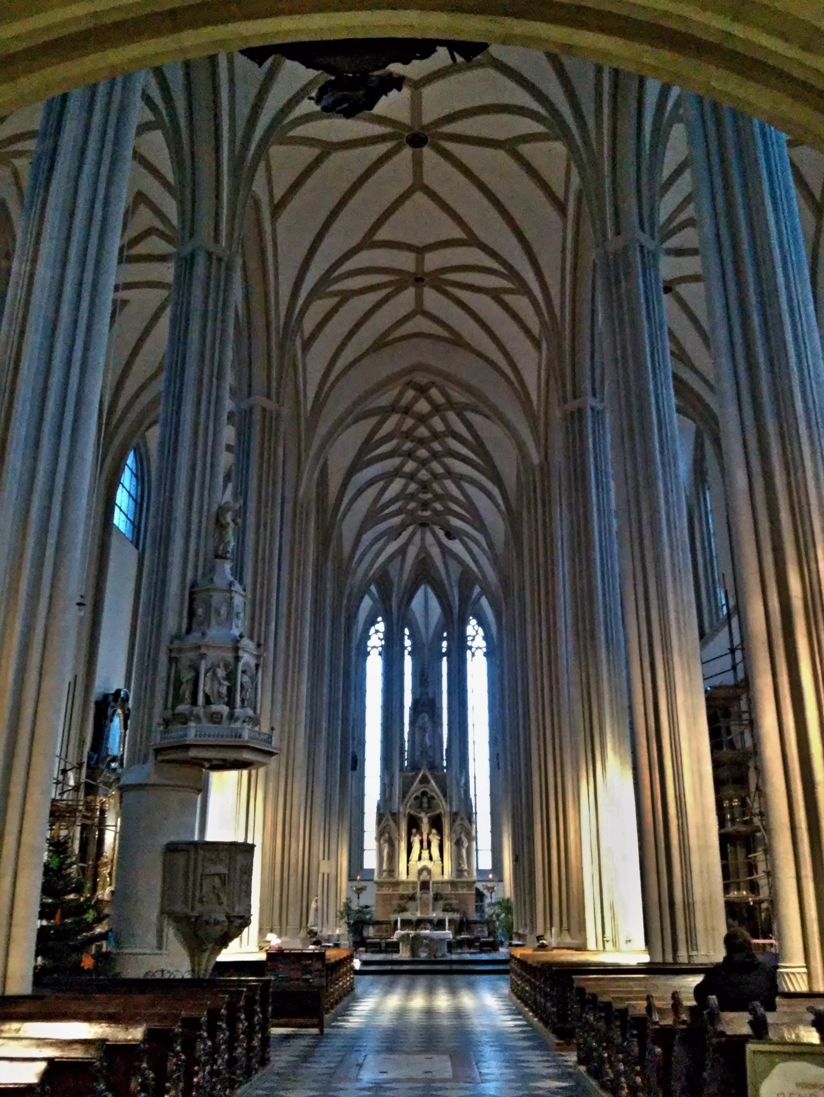 Brno, kostel sv. Jakuba